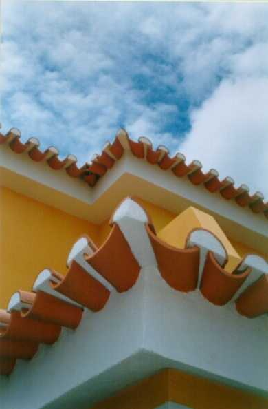 Pormenor de acabamento de telhado numa moradia com estrutura em Light Steel Framing.